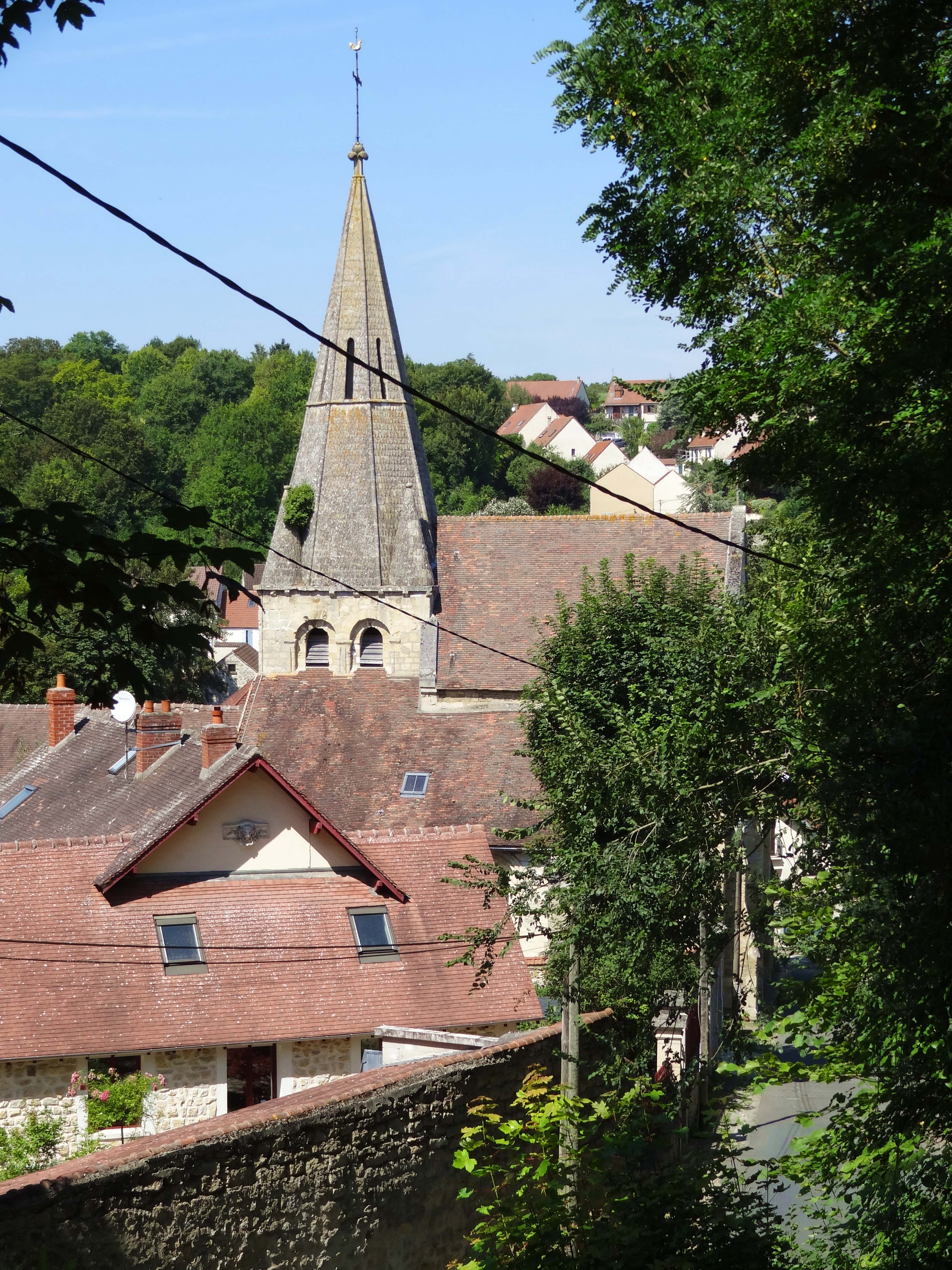 Église Notre-Dame-de-l'Assomption de Gaillon-sur-Montcient - voir titre.